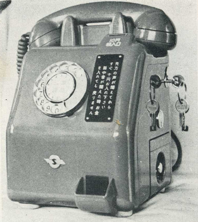 1950年代の硬貨式公衆電話機